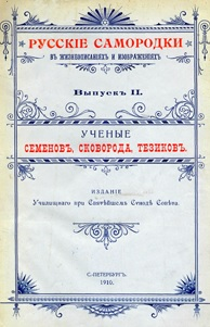 Титульный лист издания: Ученые Семеновъ, Сковорода, Тезиковъ. Русскiе самородки въ жизнеописанiяхъ и изображенiяхъ. Москва, 1910.